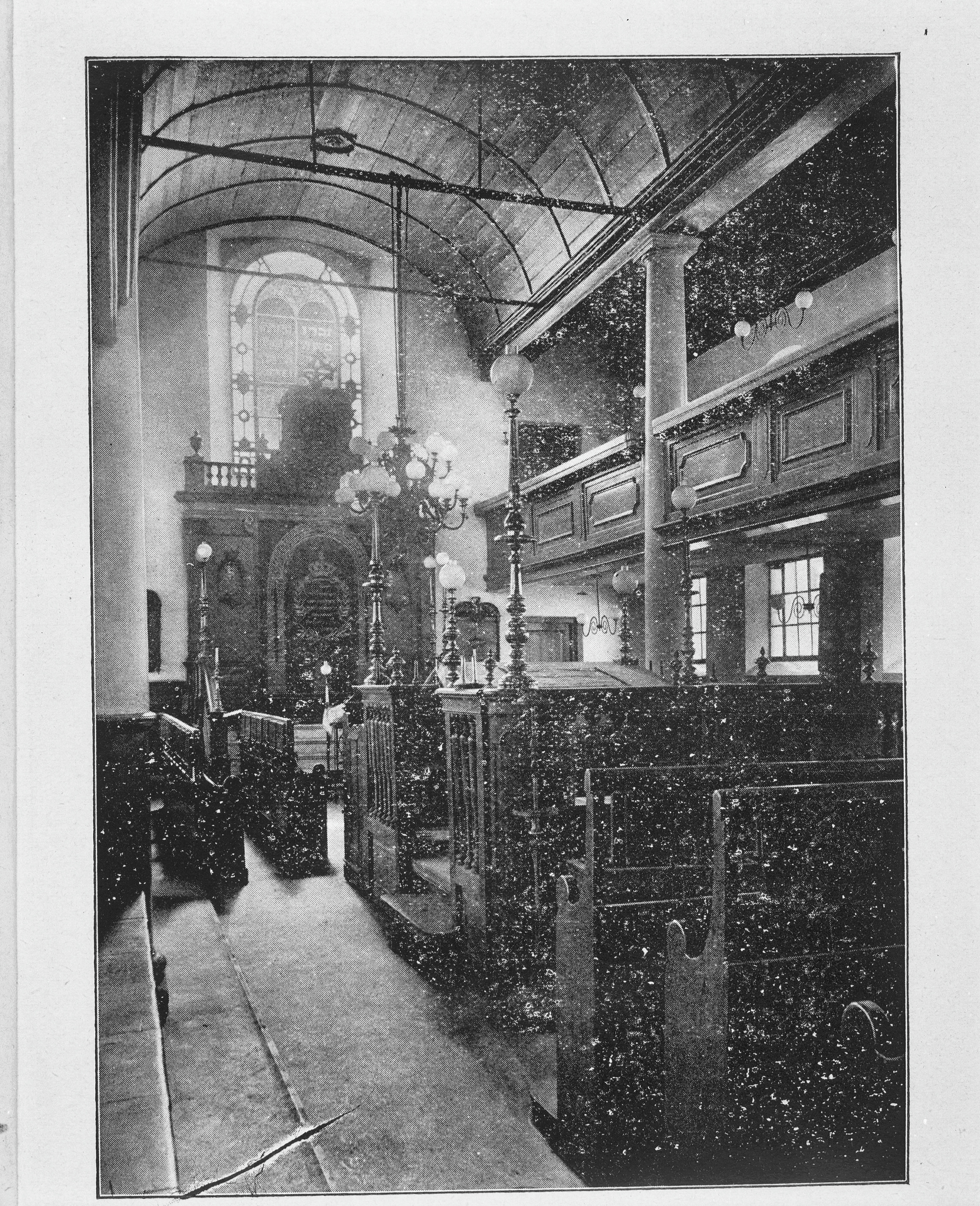 Nederlands Israëlische Hoofdsynagoge: interieur